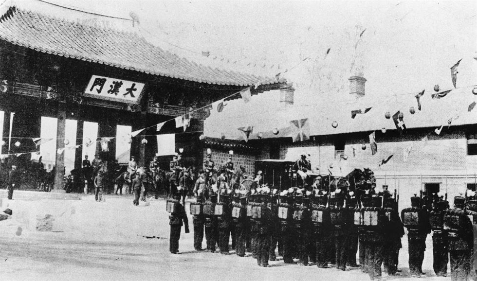 徳寿宮大漢門前で高宗皇帝の出御式典を行う大韓帝国軍。